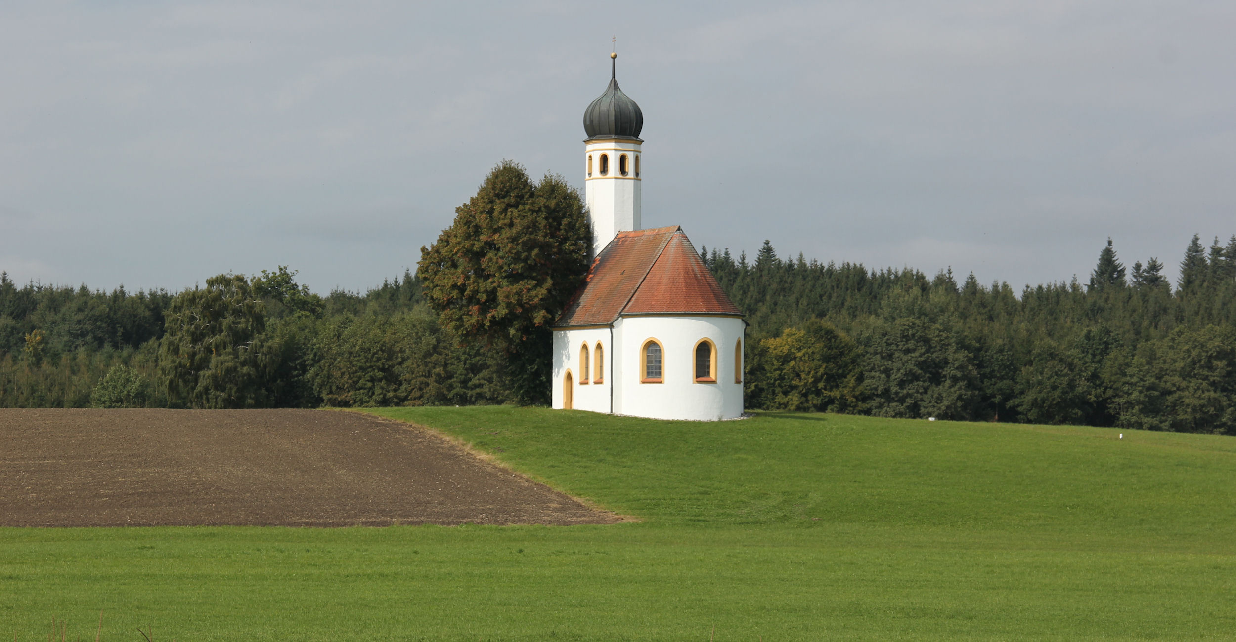 Moorenweis, Bavaria, Germany